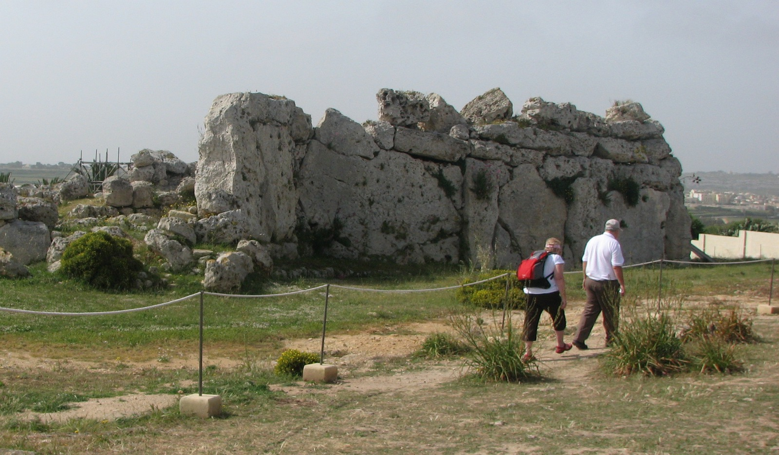 Autoriaus nuotrauka, 2008.04.19. Malta. Gozo sala. Neolito laikų šventykla. Nuotrauka gali būti platinama pagal GFDL licenciją.